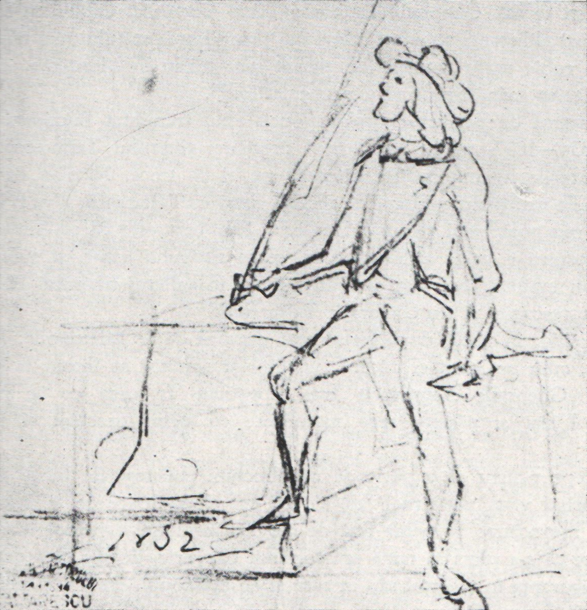 Gheorghe Tattarescu - Desen din copilarie - Muzeul Gheorghe Tattarescu din Bucuresti